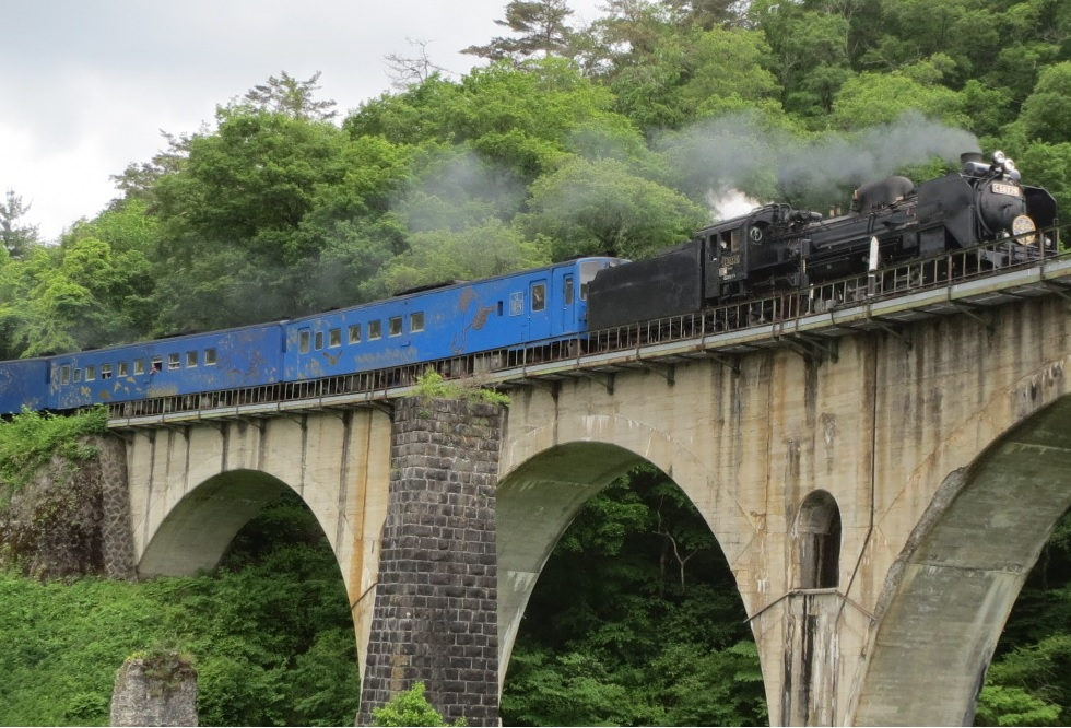 遠野市にあるJR釜石線宮守川橋梁。定期的にSLが走行するため観光スポット、撮影スポットとなっている。